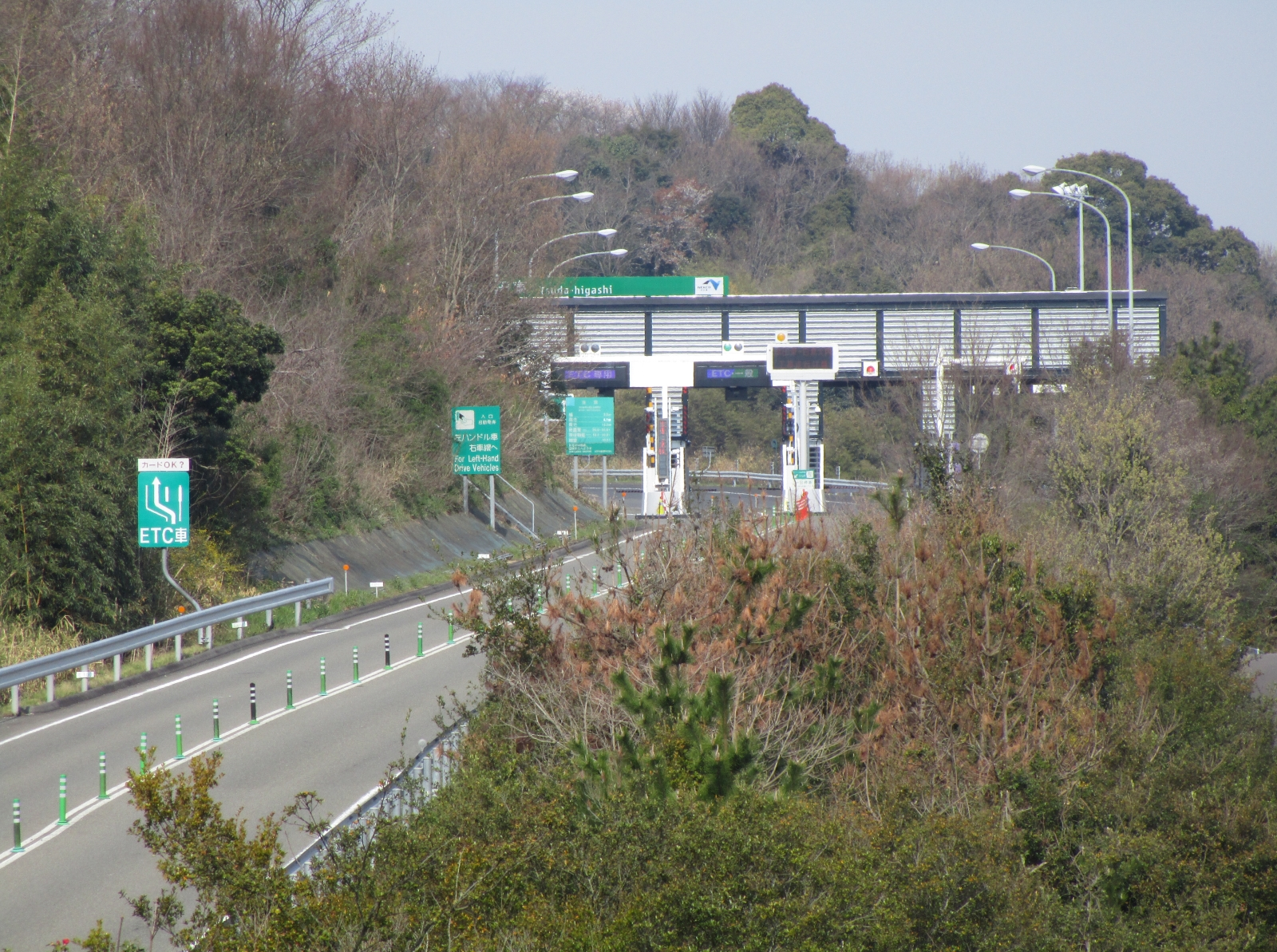 津田東インターチェンジ料金所